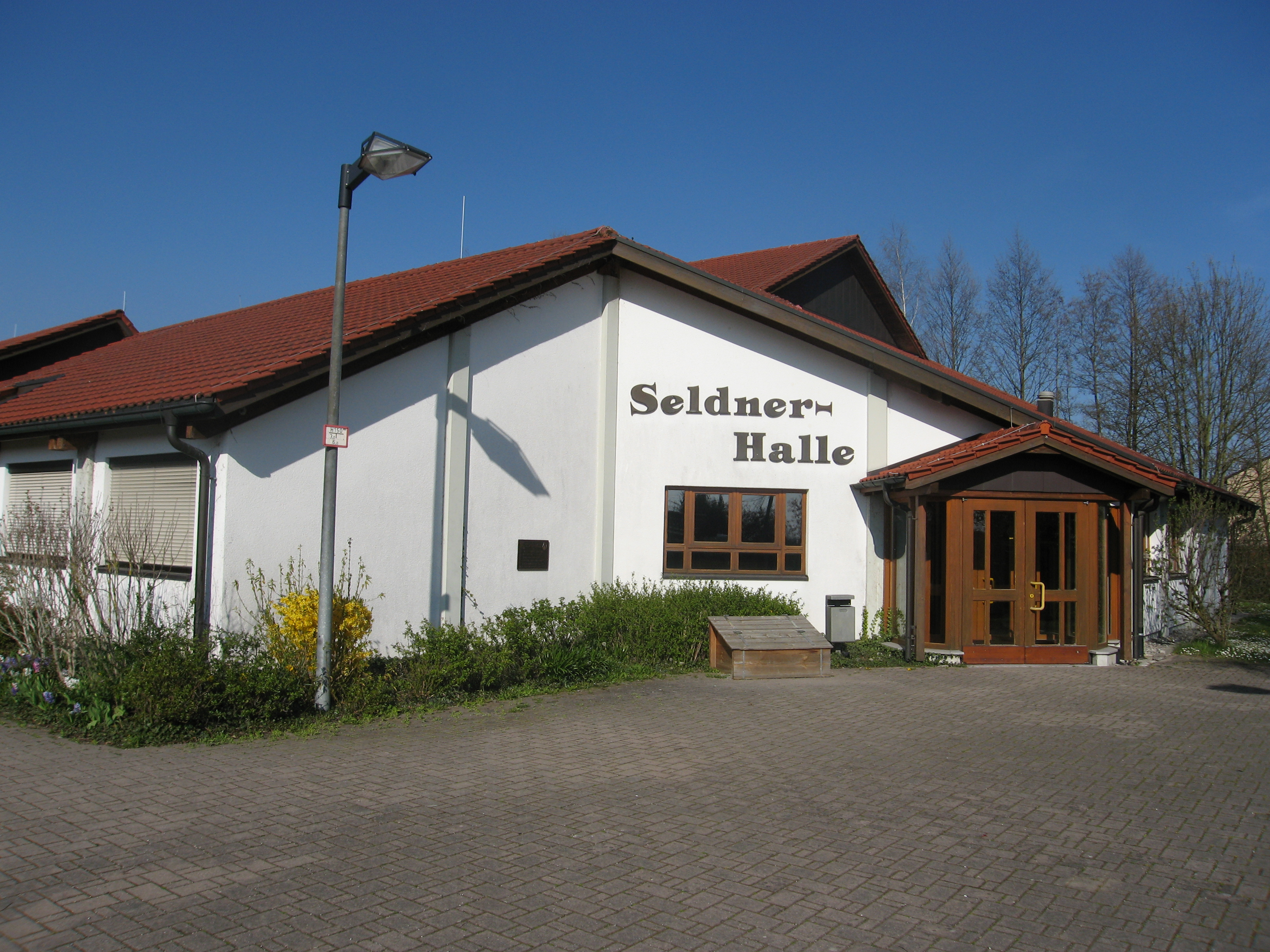 Die Seldnerhalle in Kau, Stadtteil von Tettnang